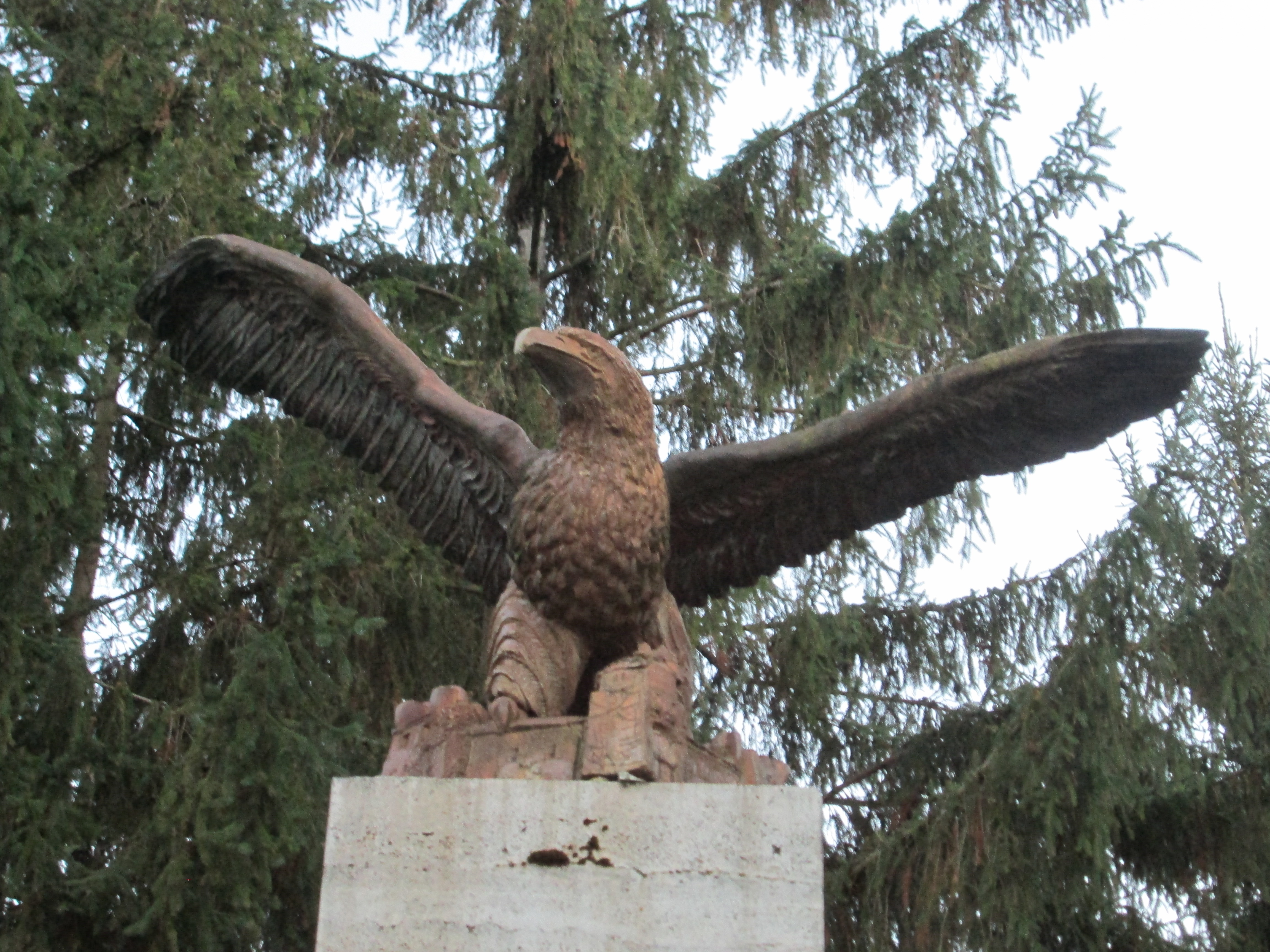 A szendrői Hősi emlékmű turulmadara.